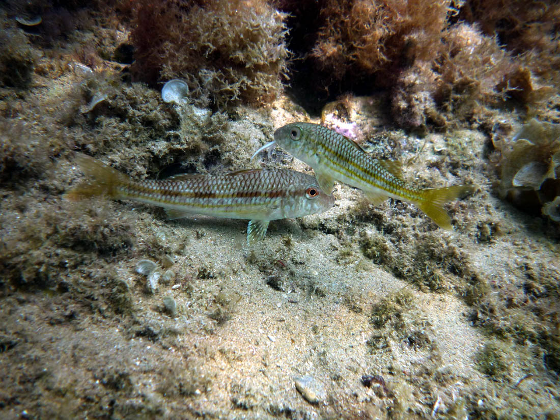 Mullus surmuletus (salmonete) en El Portús (Cartagena, Spain)